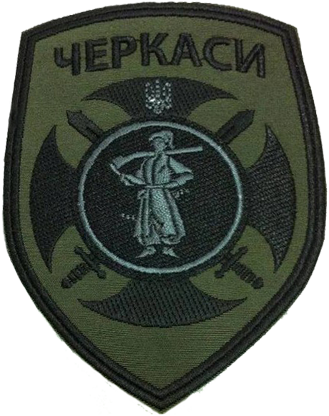 Нарукавна емблема 14-го Батальйону теріторіальної оборони «Черкаси» Черкаської області.